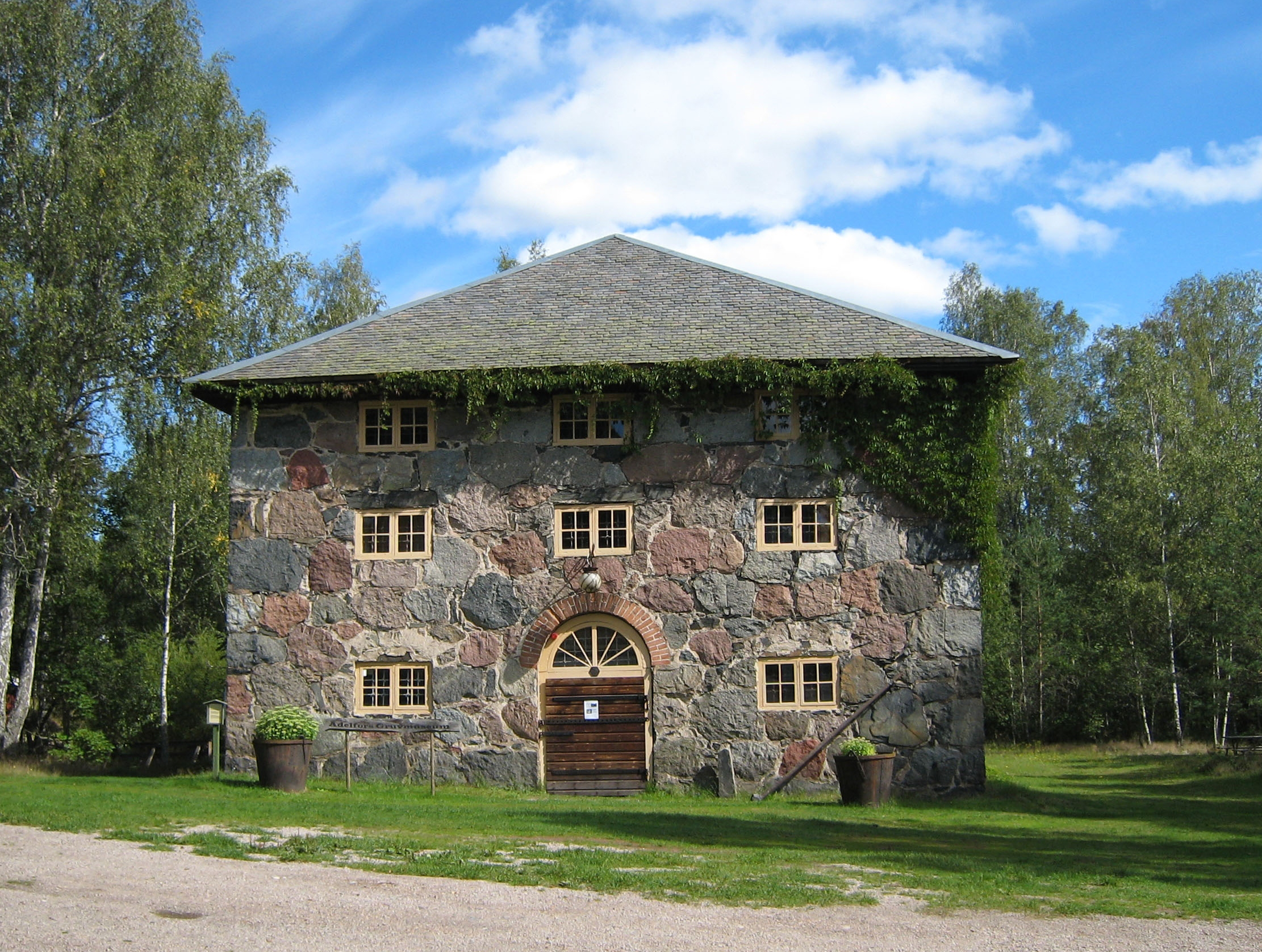 Stenmagasinet i Ädelfors, Alseda församling